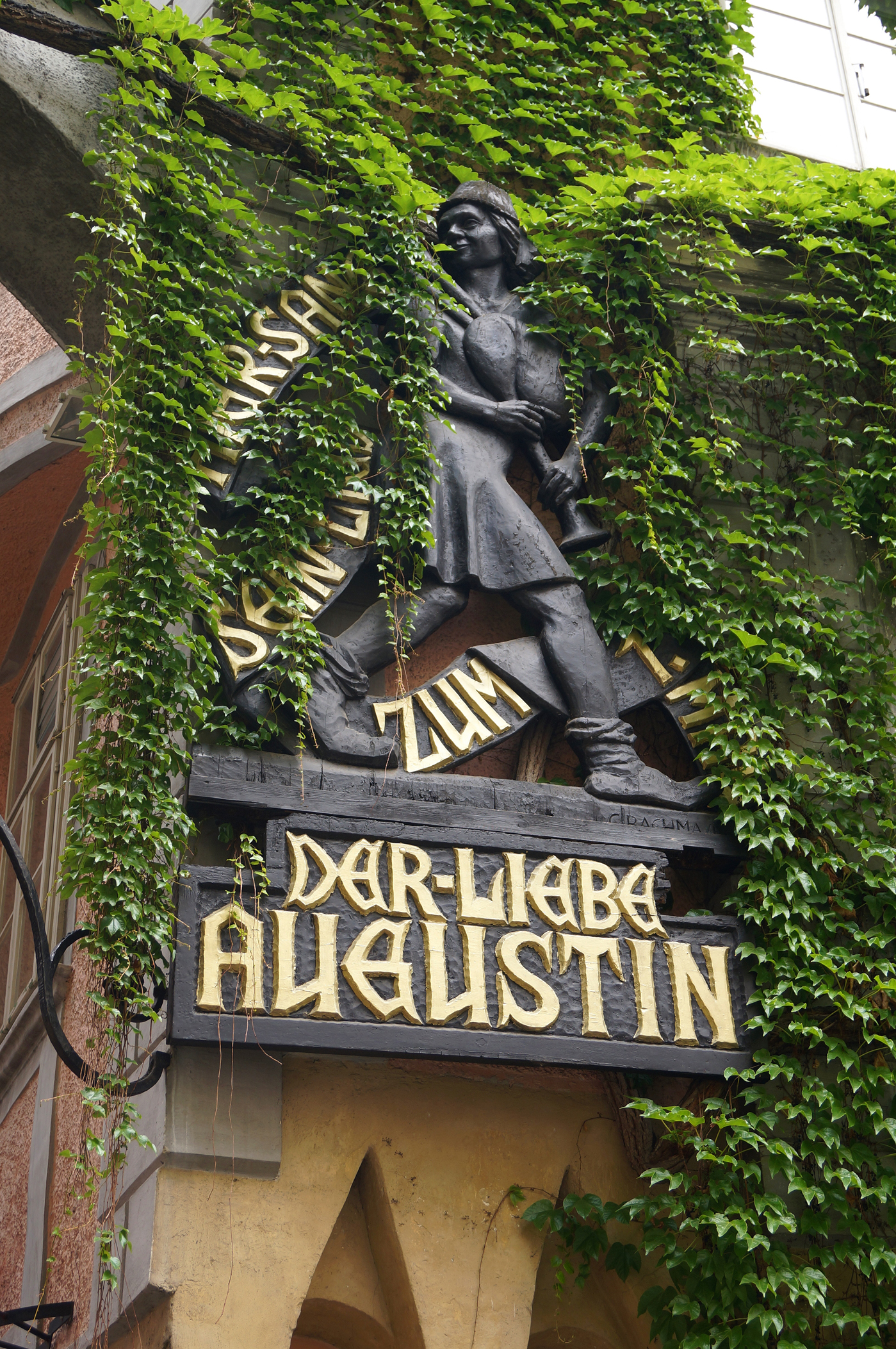 "Der liebe Augustin" an der Fassade des Griechenbeisls